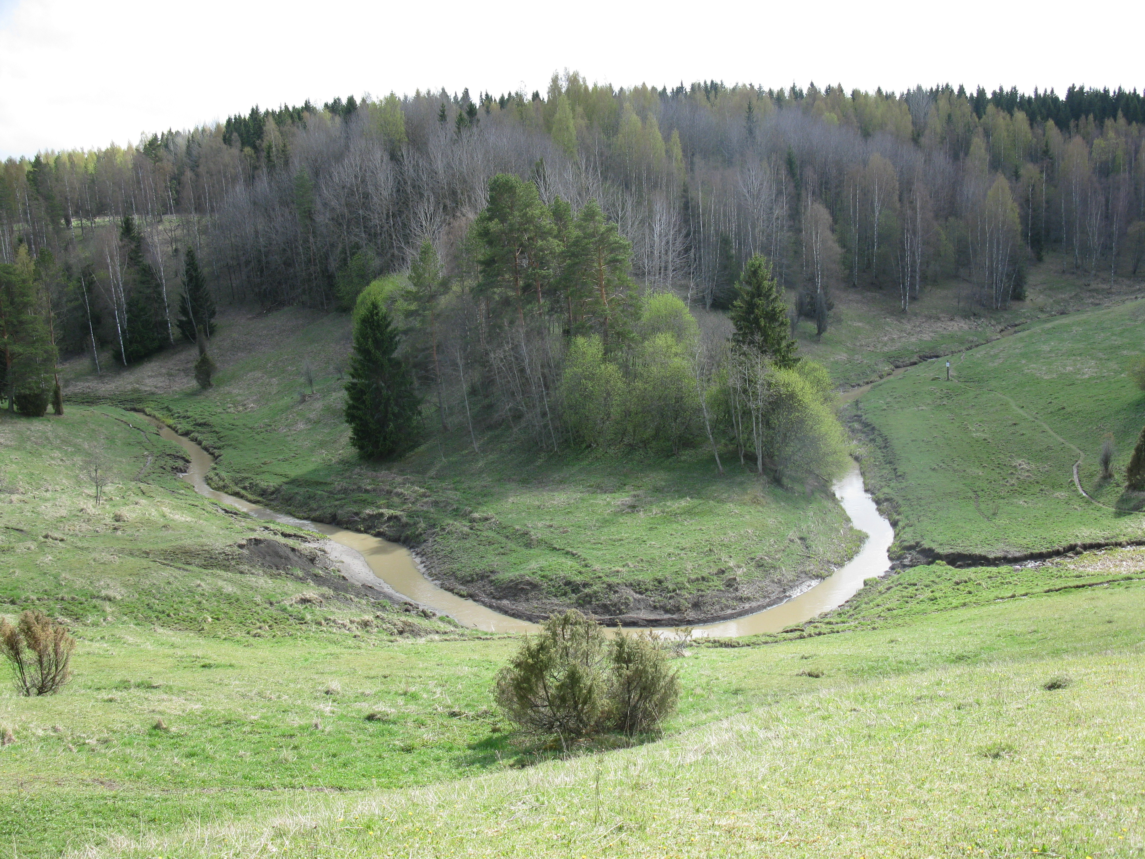 Häntälän notkojen luontopolkua Rekijokilaakson Natura 2000 -suojelualueella Somerolla.